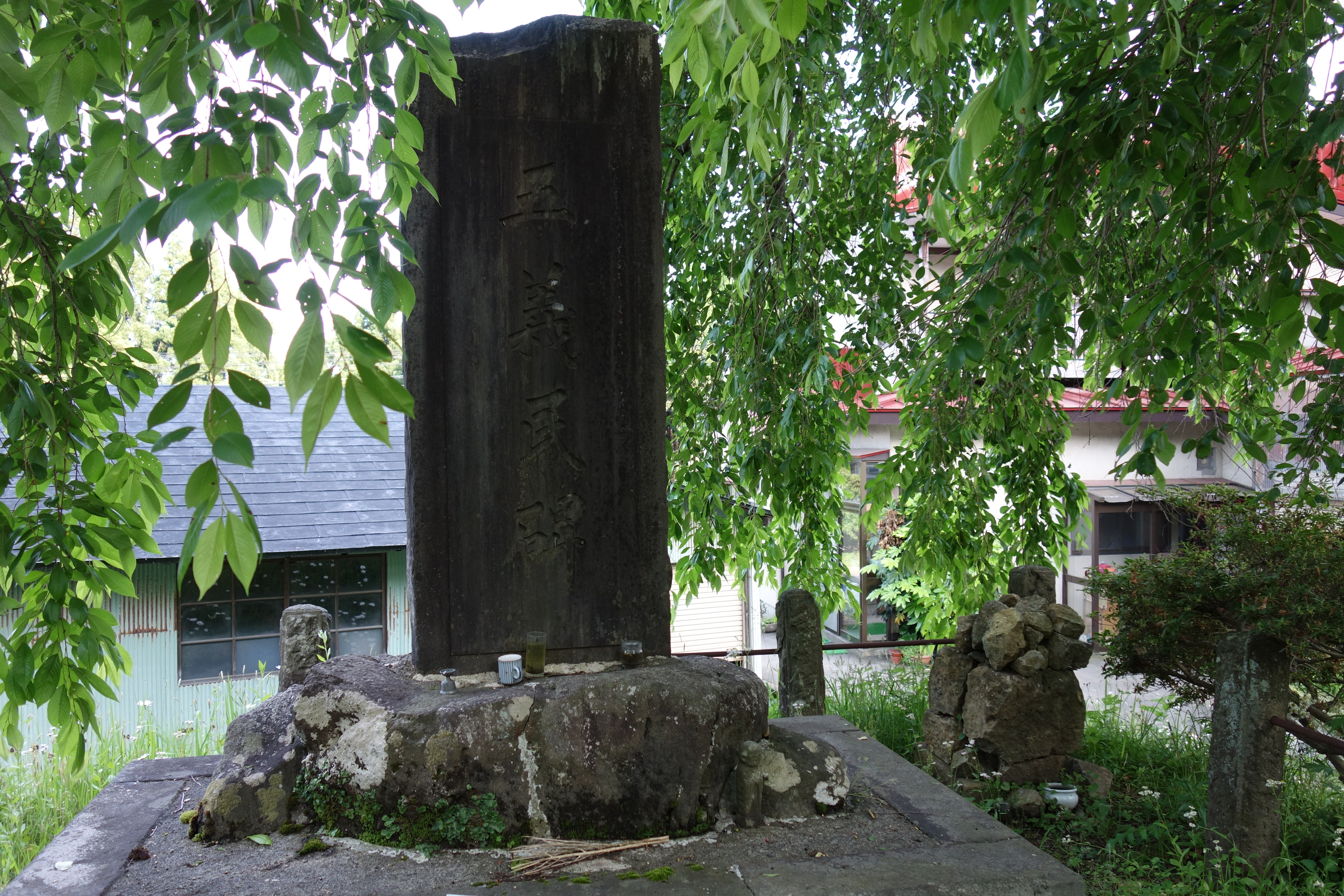 五義民首切り塚